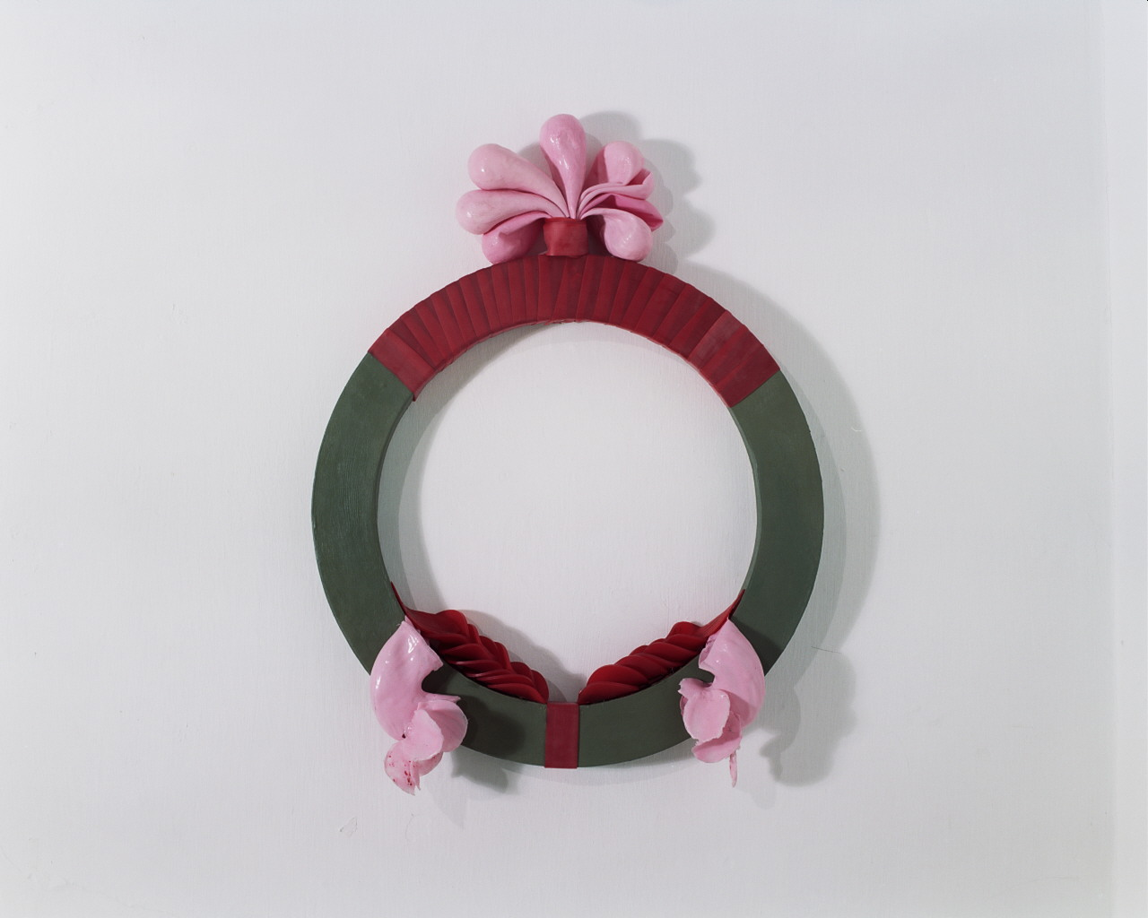 "זרים" - פרט, פסל